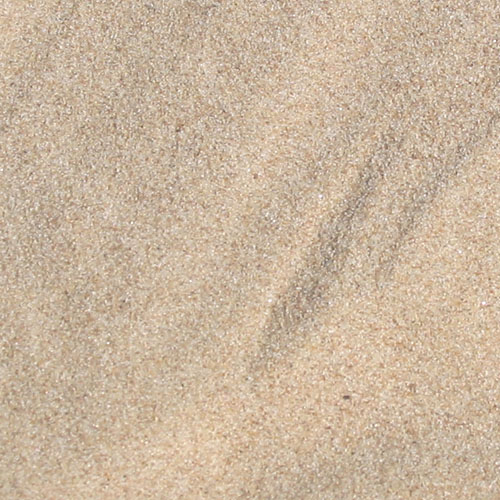 Liiv